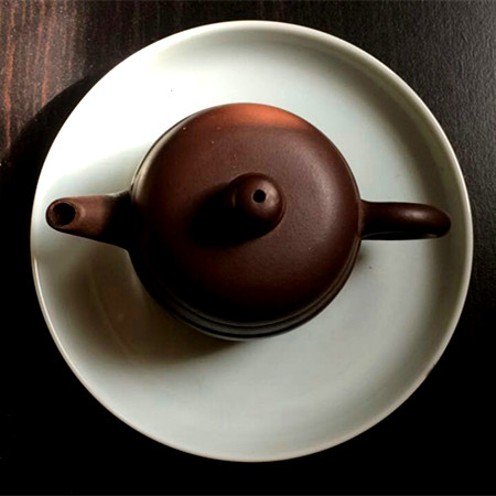 壺承和紫砂壺